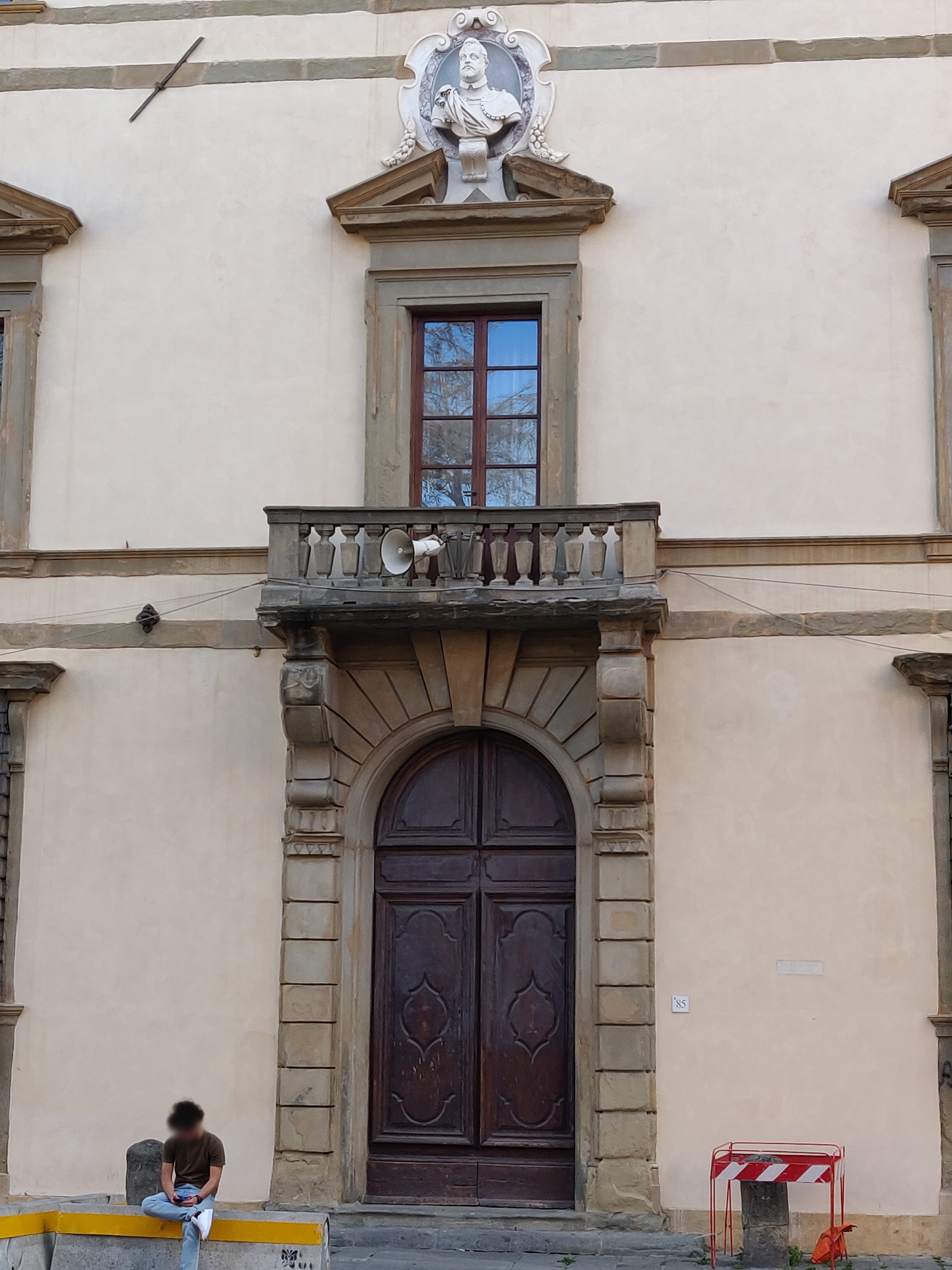 Dettaglio dell' impianto centrale di Palazzo Boilleau, portale principale, balcone, stemma. Il soggetto è Palazzo Boilleau sede del Dipartimento di Filologia letteratura e linguistica dell' Università di Pisa